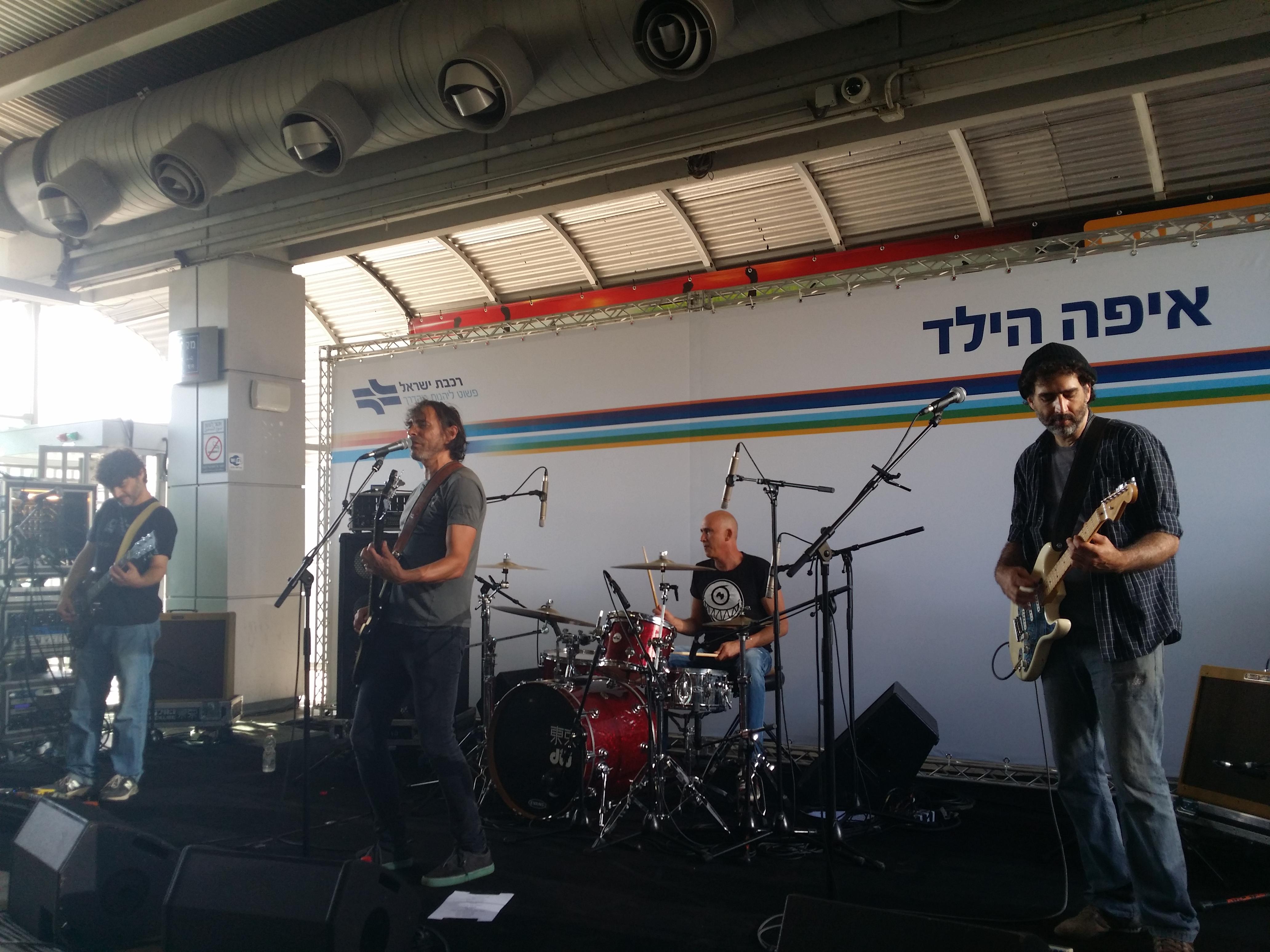 הופעה של להקת איפה הילד, בתחנת רכבת סבידור, תל אביב